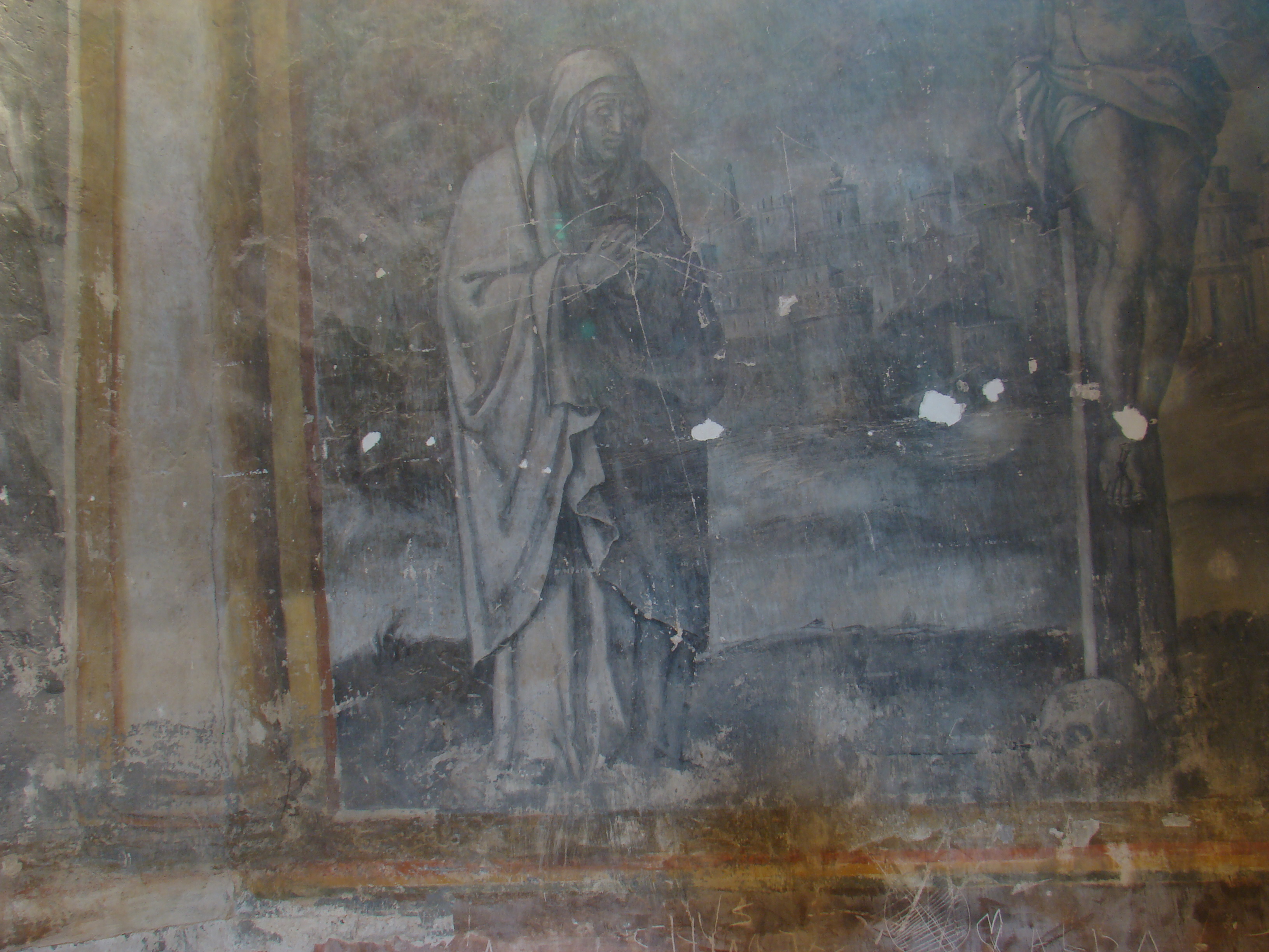 Monasterio de Palazuelos. Grisallas del pintor romanista Antonio Stella del siglo XVI en los muros de la sacristía llamada comúnmente chirola. Están sin restaurar.